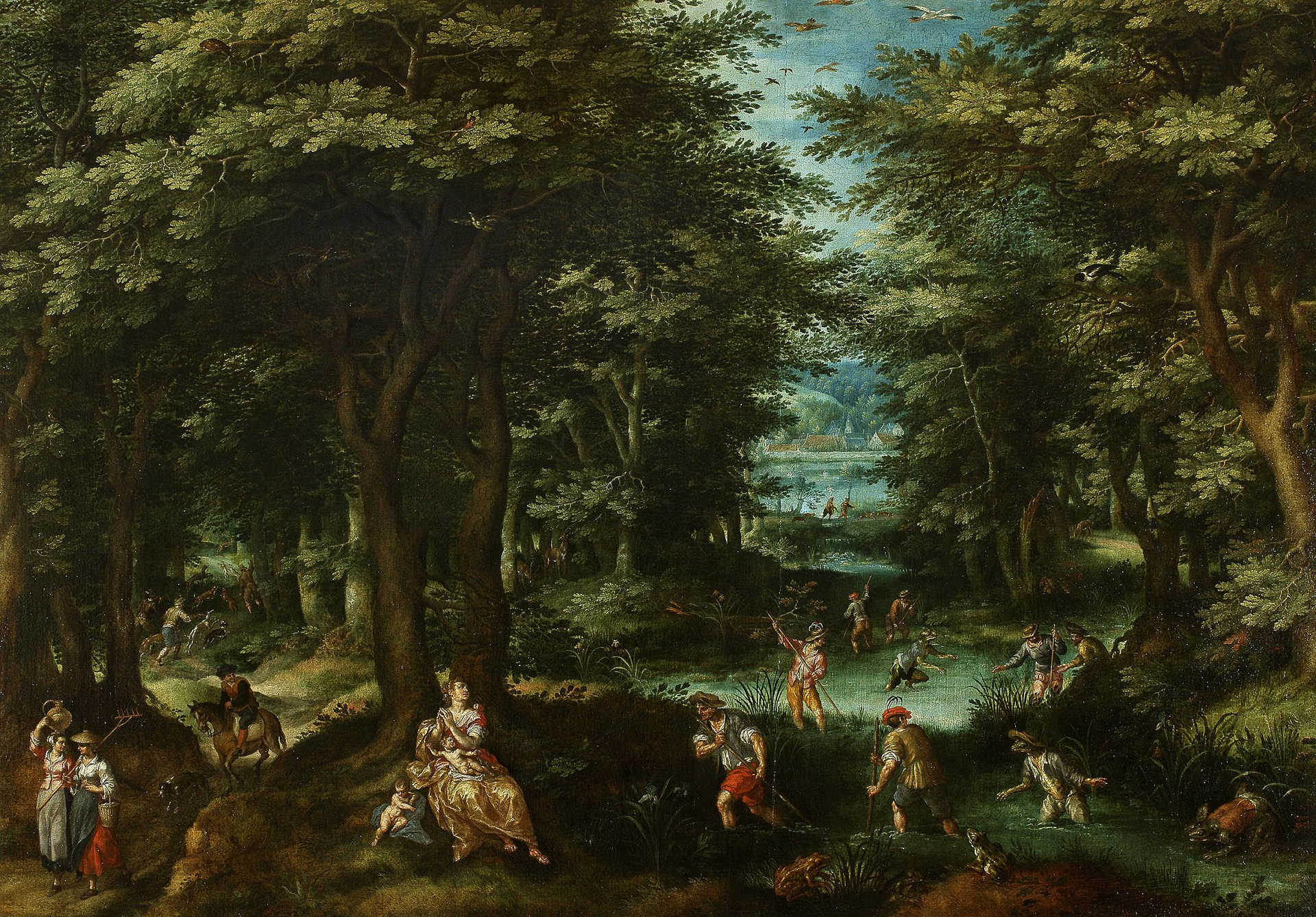 Гиллис ван Конинкслоо "Пейзаж с изображением мифа о Латоне и ликийских крестьянах". Холст, масло. 143 × 204 см. Государственный Эрмитаж